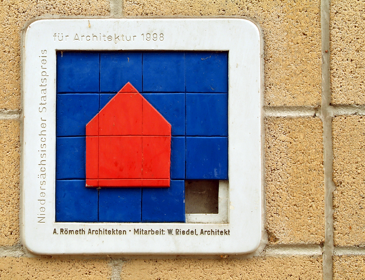 Für den Umbau des Stadtteilzentrum Neuer Markt (jetzt: WP-Eberhard-Eggers-Platz) durch Andreas Römeth, Architekten, Hannover, und Dipl.-Ing. Wolfgang Riedel, erhielten die Architekten 1998 den Niedersächsischen Staatspreis für Architektur …